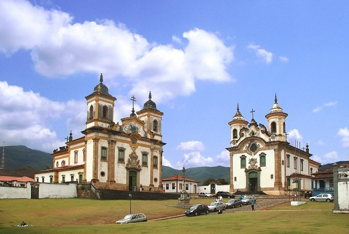 Mariana (Minas Gerais) : Eglises Saint François et N.S. do Carmo